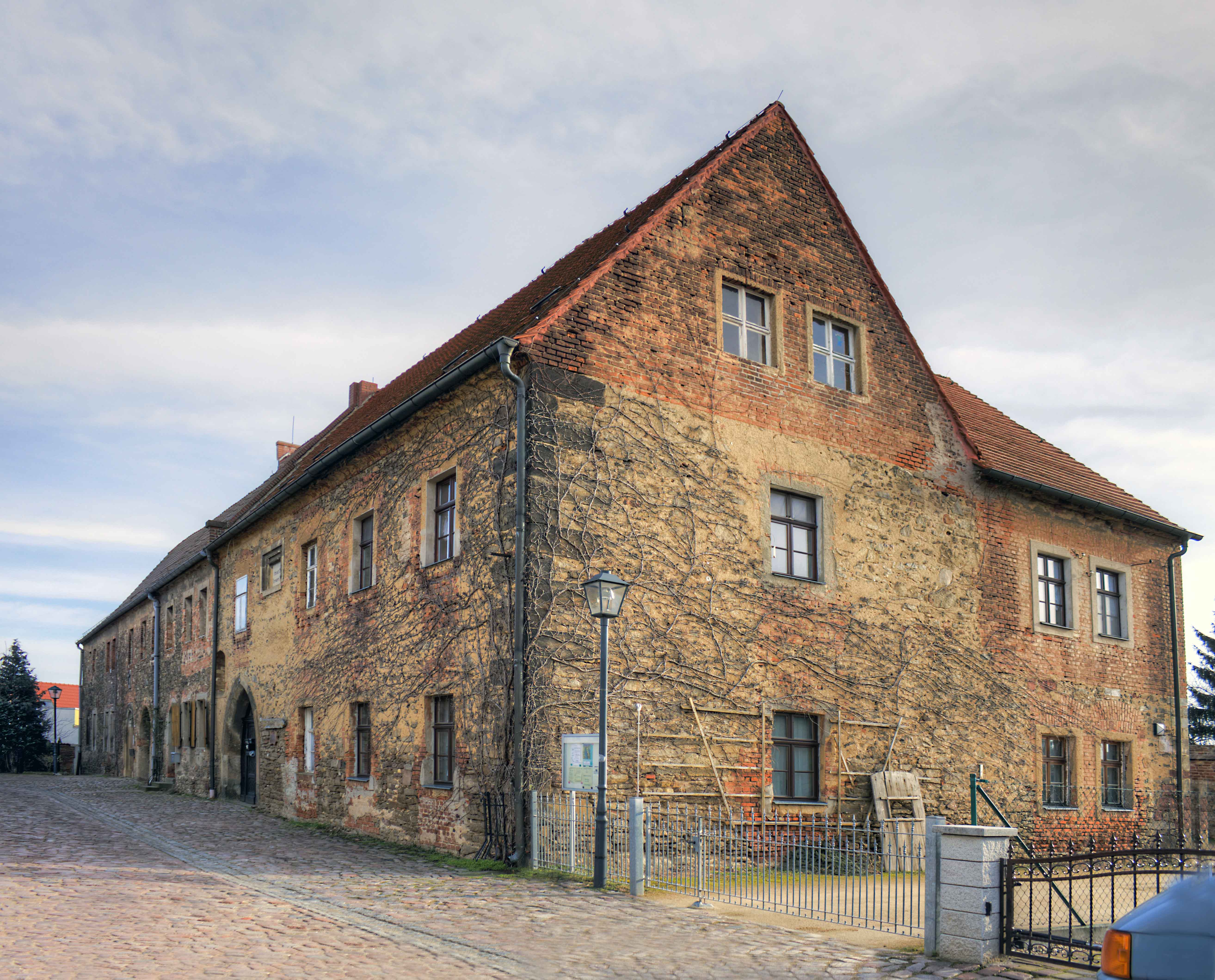 Klosterhof Belgern, Pfarrstraße 1; 2; 3 in Belgern-Schildau Stt Belgern Bemerkung: Einst als landwirtschaftlicher Klosterhof gegründet, Niederlassung des Zisterzienserorden Kloster Buch bei Leisnig